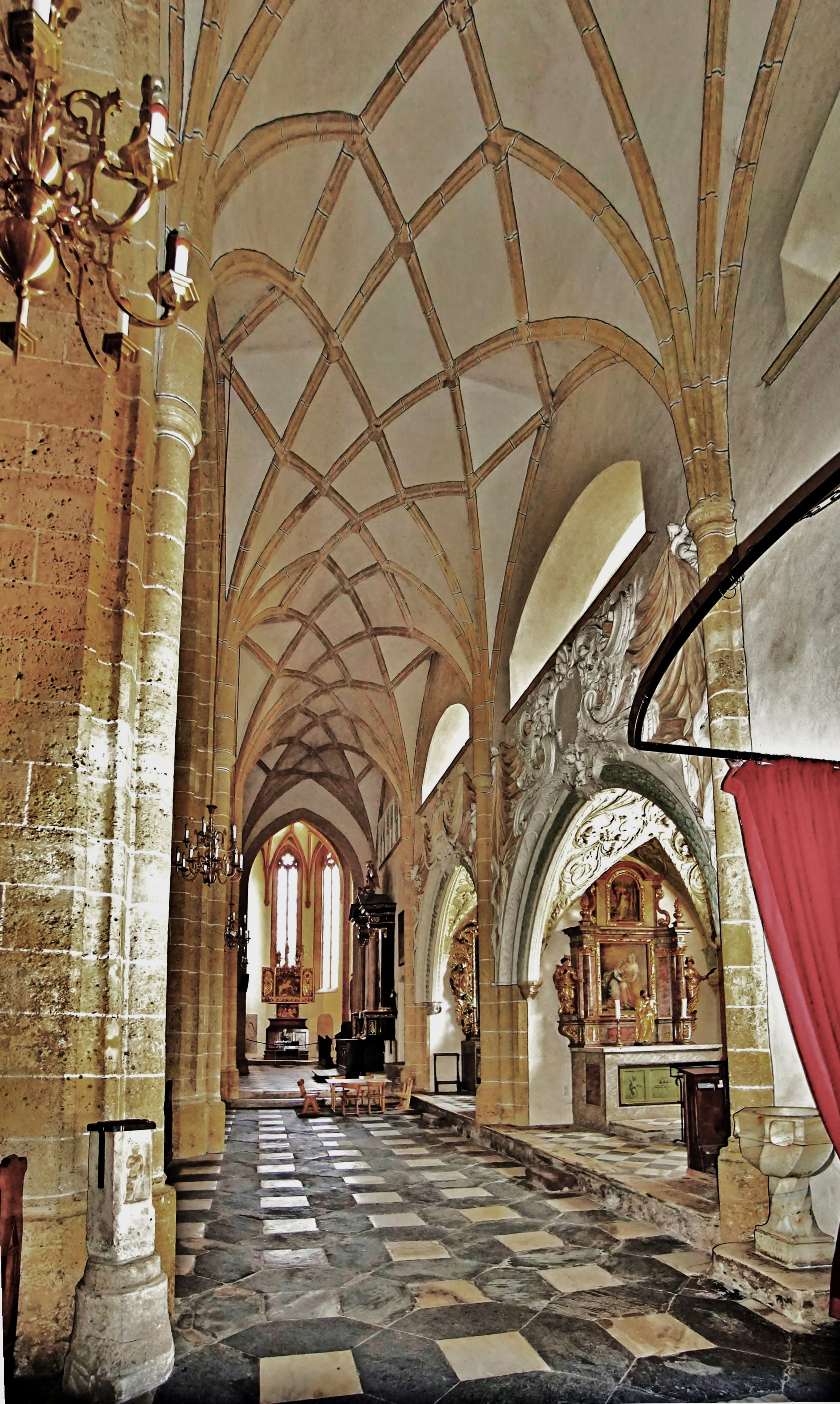 Marienkirche (Maria Saal), Innenansicht südliches Seitenschiff